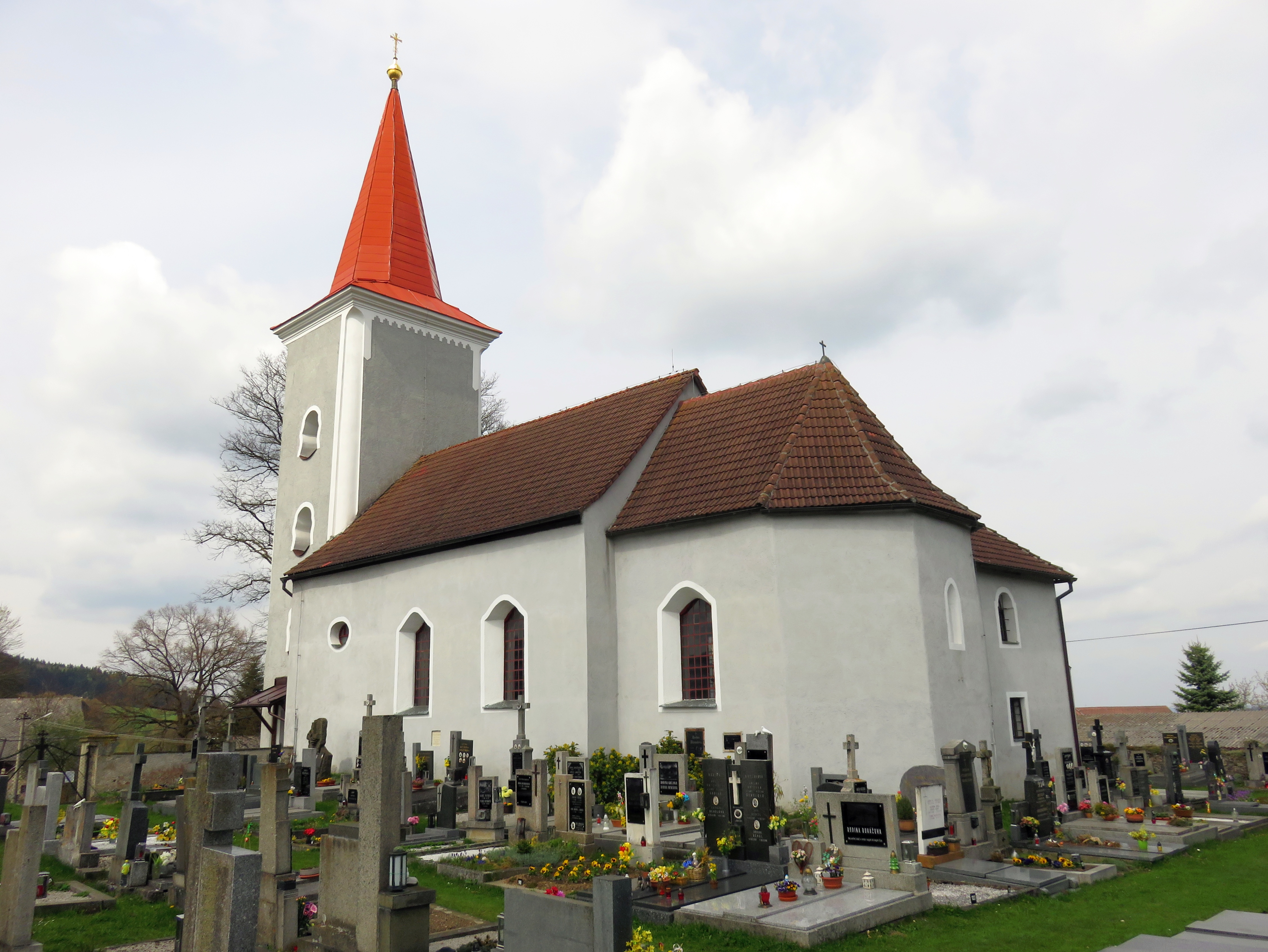 Kostel sv. Václava v Čachrově s hřbitovem – široký pohled od jihovýchodu.